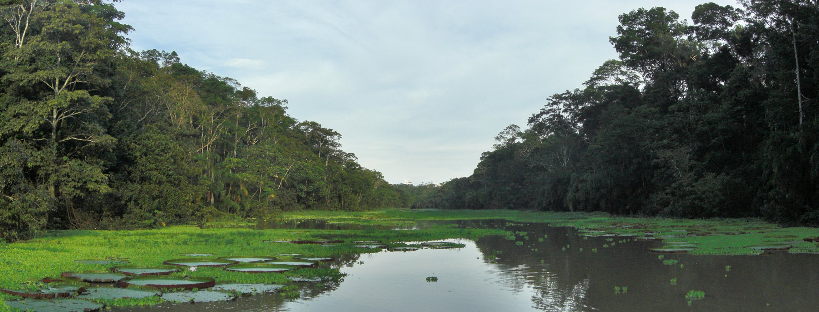 Amazon River, near Indiana, Peru, 20130114